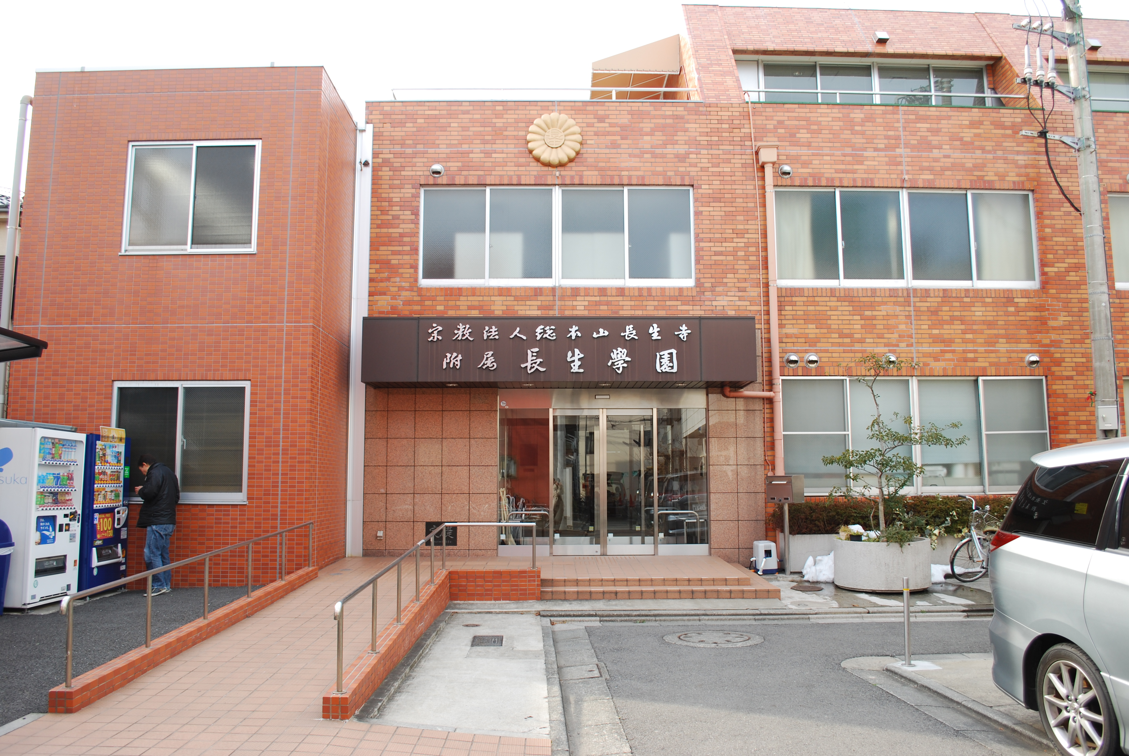 外観写真